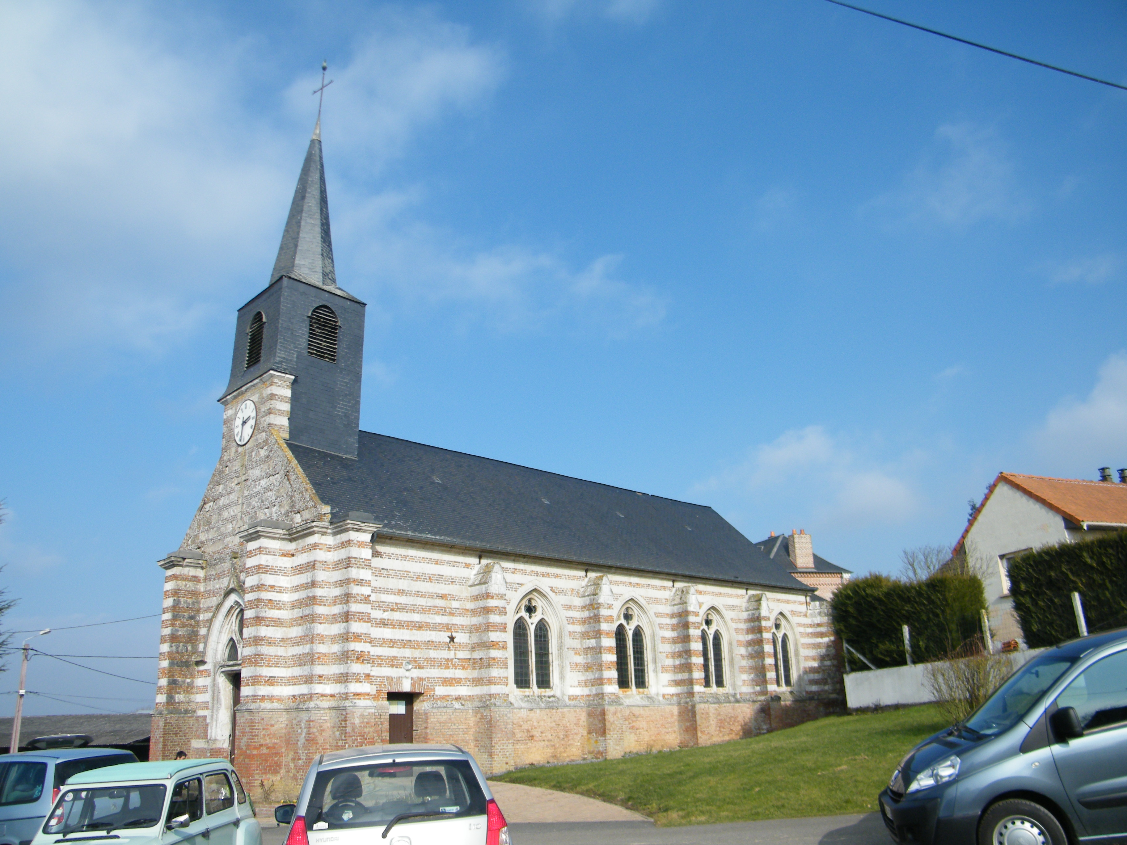 L'église, côté sud.